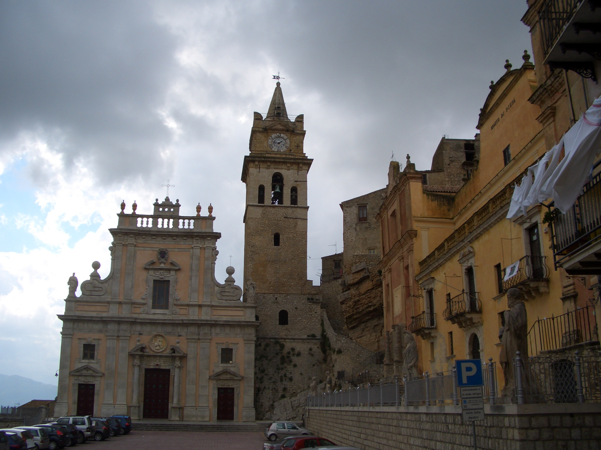 Il duomo e la piazza a Caccamo